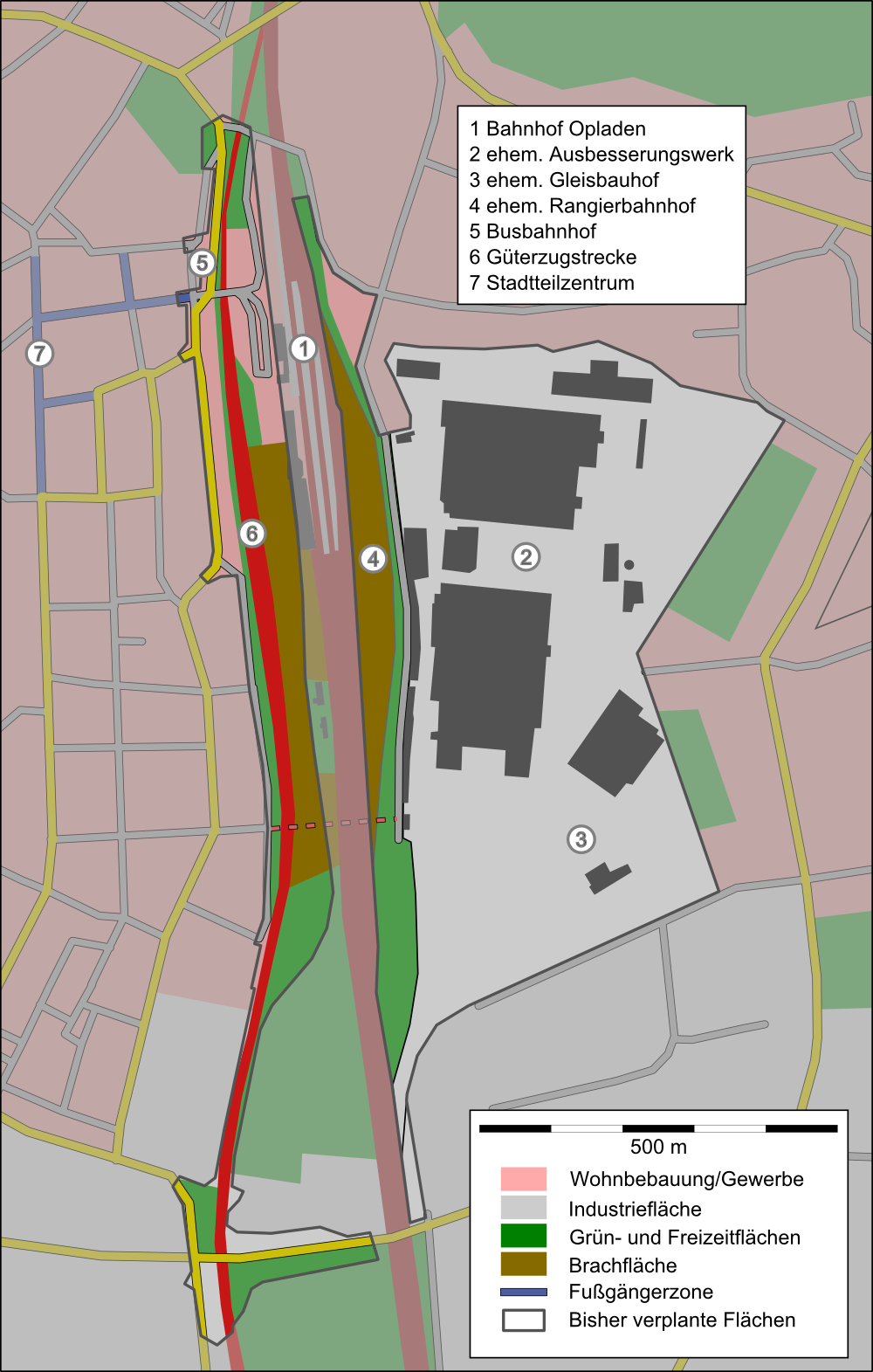 Übersichtskarte Neue Bahnstadt Opladen, Zustand 2007. Die "Neue Bahnstadt Opladen" ist ein Projekt zur Nutzung ehemaligen Bahngeländes in Leverkusen-Opladen.